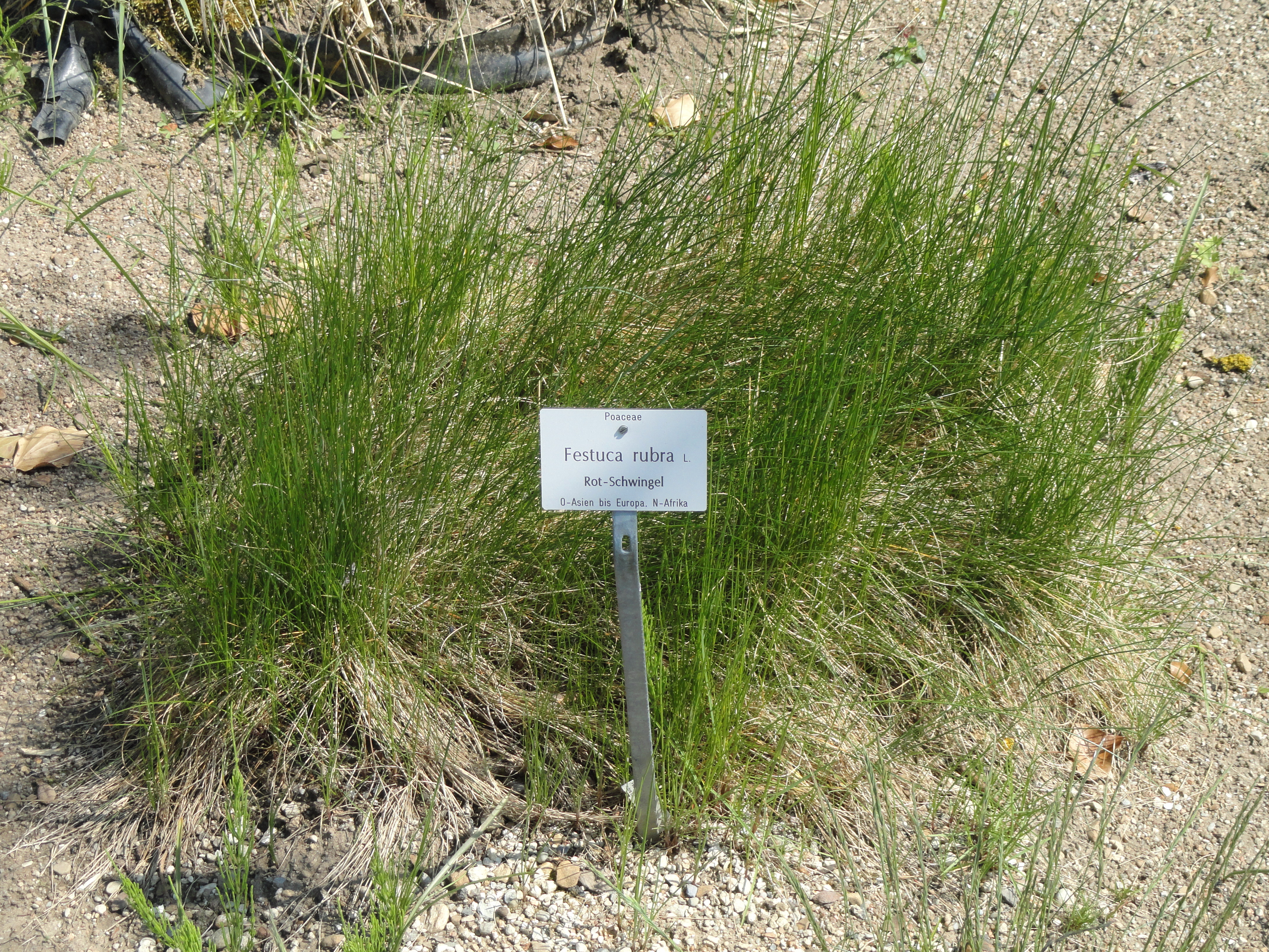 Festuca rubra specimen in the Botanischer Garten München-Nymphenburg, Munich, Germany.